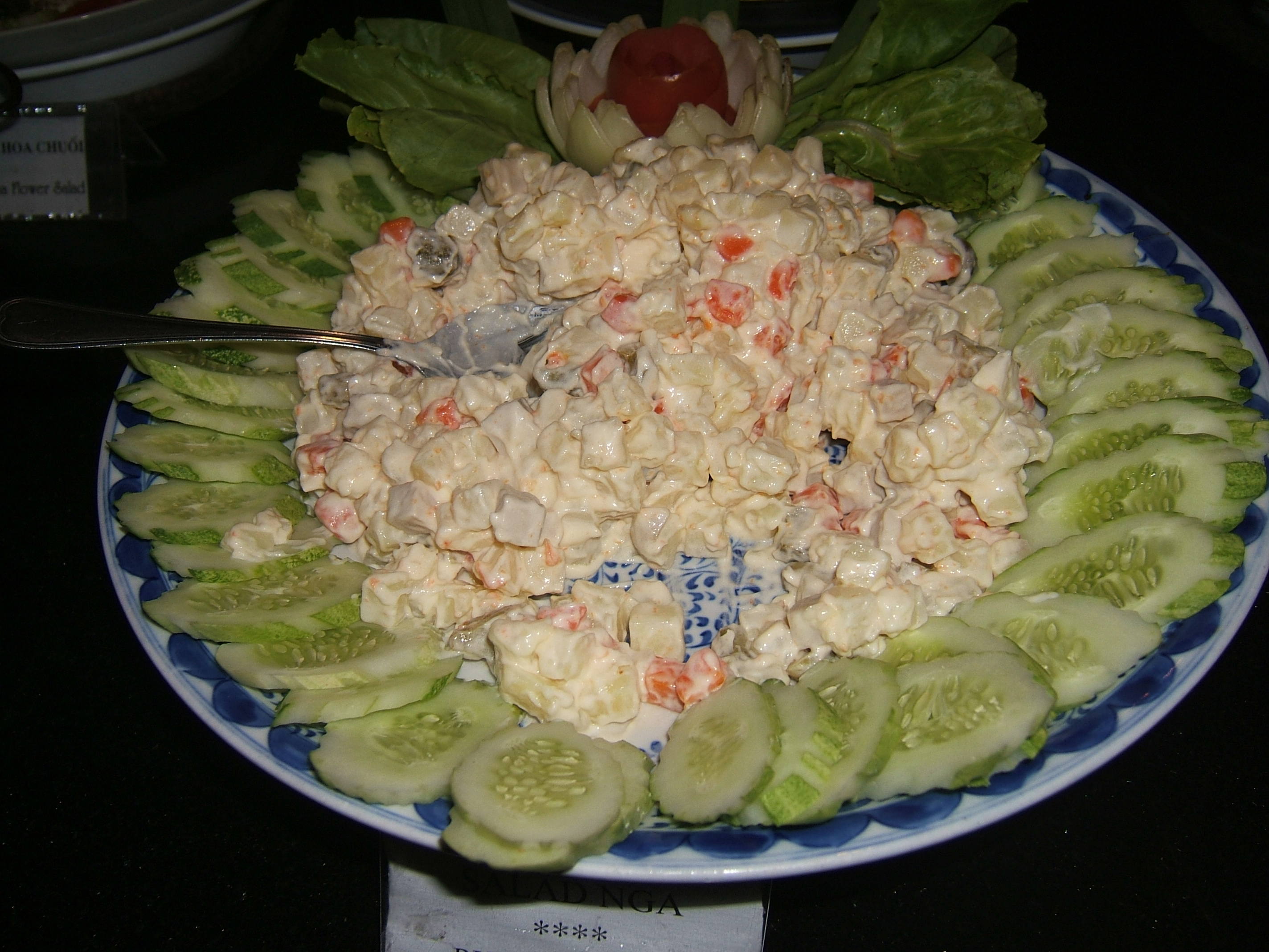 Một đĩa xa lát Nga do Khương Việt Hà chụp tại quán Sen, Hà Nội.